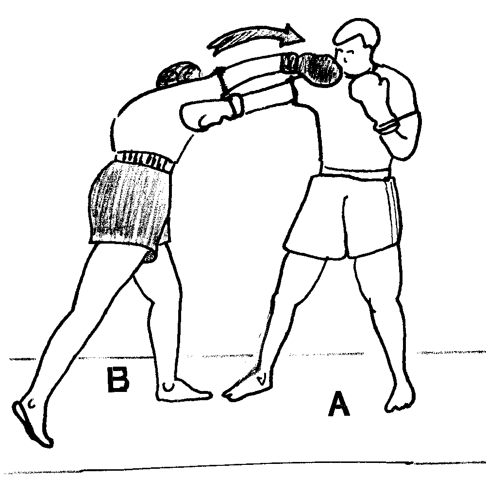 drop3.jpg